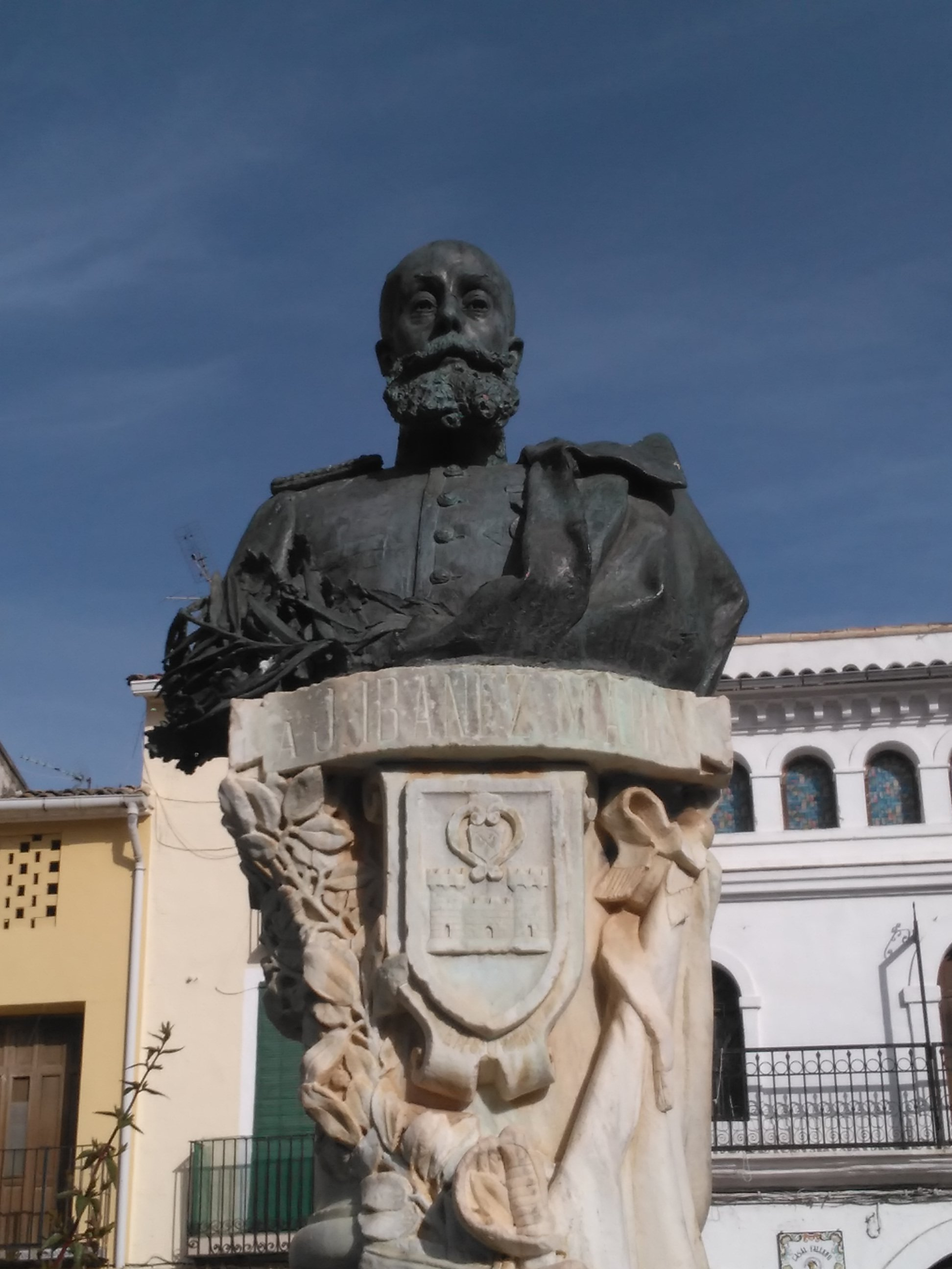 Busto de D. José Ibáñez Marín, en la plaza de su mismo nombre (Enguera, Valencia).